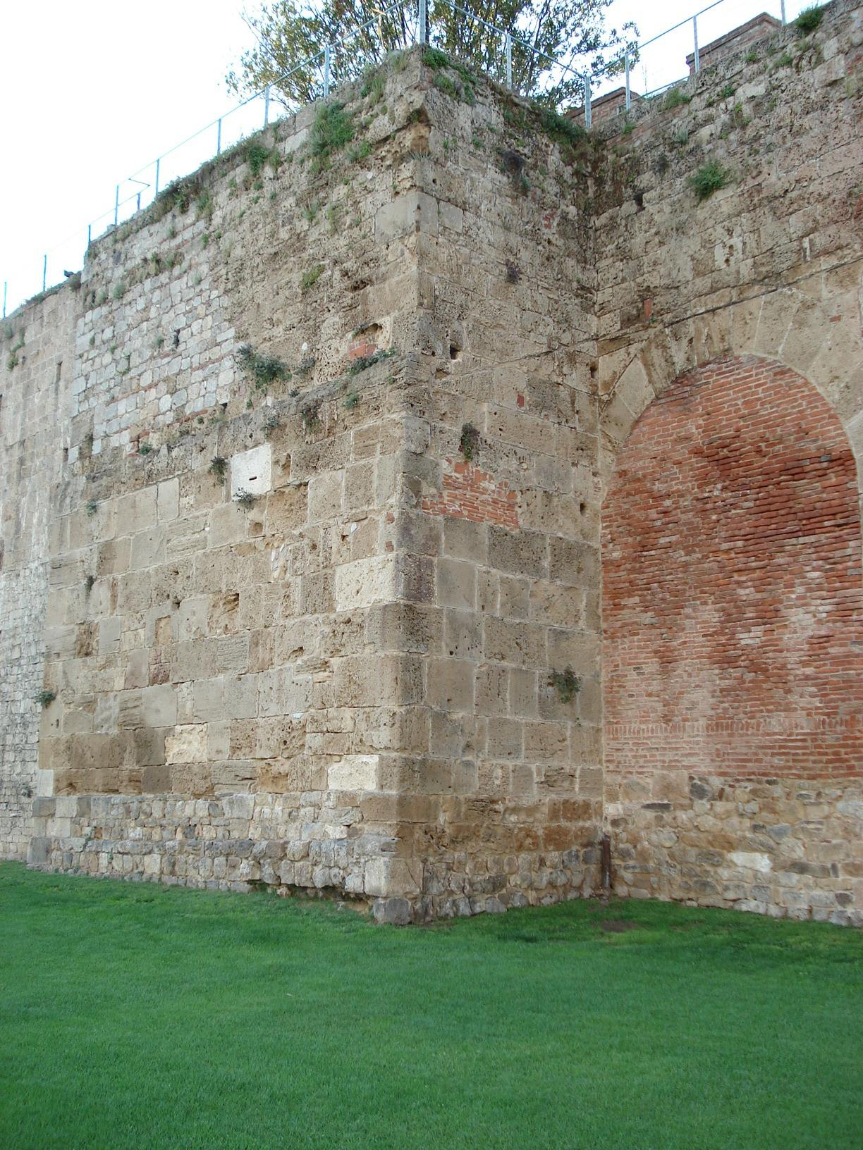 Torre del Leone